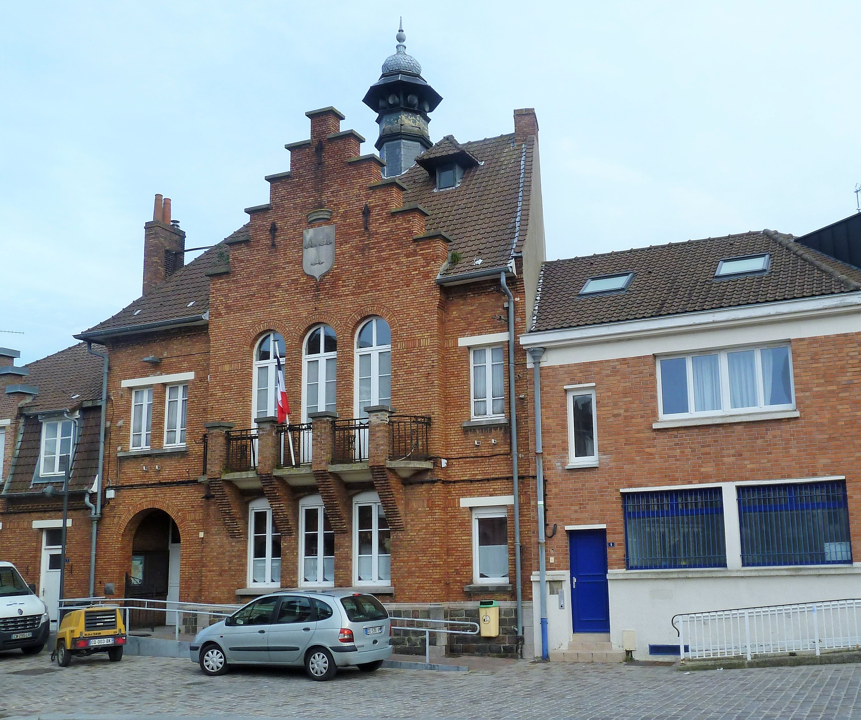 L'ancienne mairie de Bousbecque Nord (département_français)